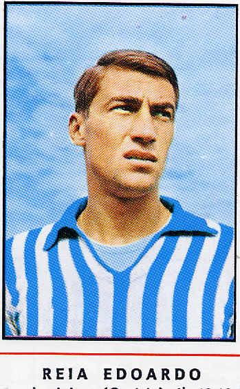 Edy Reia che indossa la maglia del Napoli